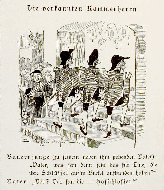 Die verkannten Kammerherrn